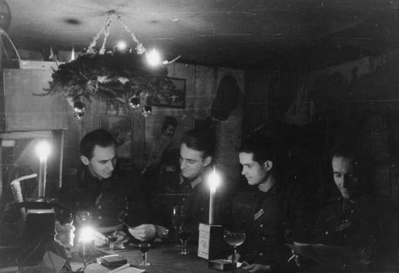 Bei Goldap, Vorweihnacht im Bunker Prop.-Kp. KBZ Mitte Film Nr. 483a/33 Bildberichter Tiemenn Ort: ostw. Goldap Datum: 10.12.44 Weihnachten 1944 [Scherl Bilderdienst]